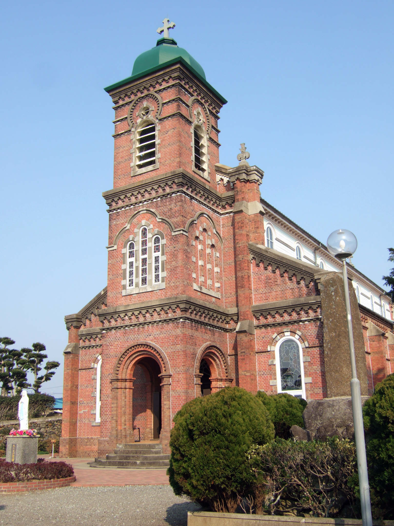 田平天主堂（カトリック田平教会,Tabira Catholic Church）